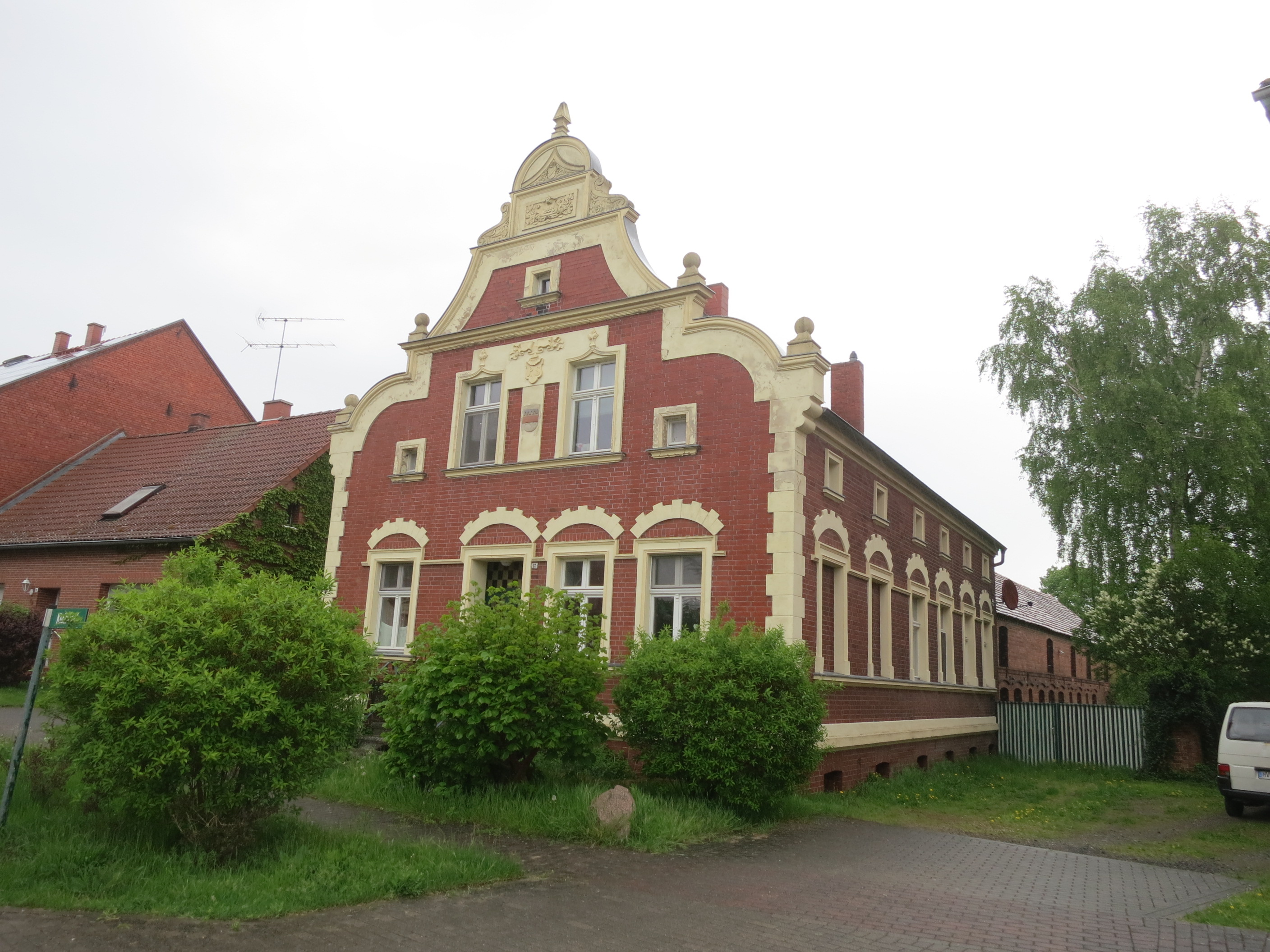 Denkmalgeschütztes Wohnhaus Kleindorf 12 in Strodehne